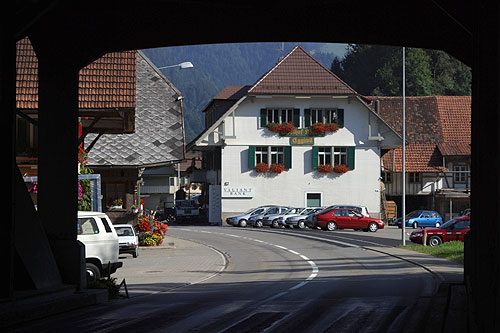 Eggiwil - Dorfeinfahrt von Nordwesten her (Holzbrücke)